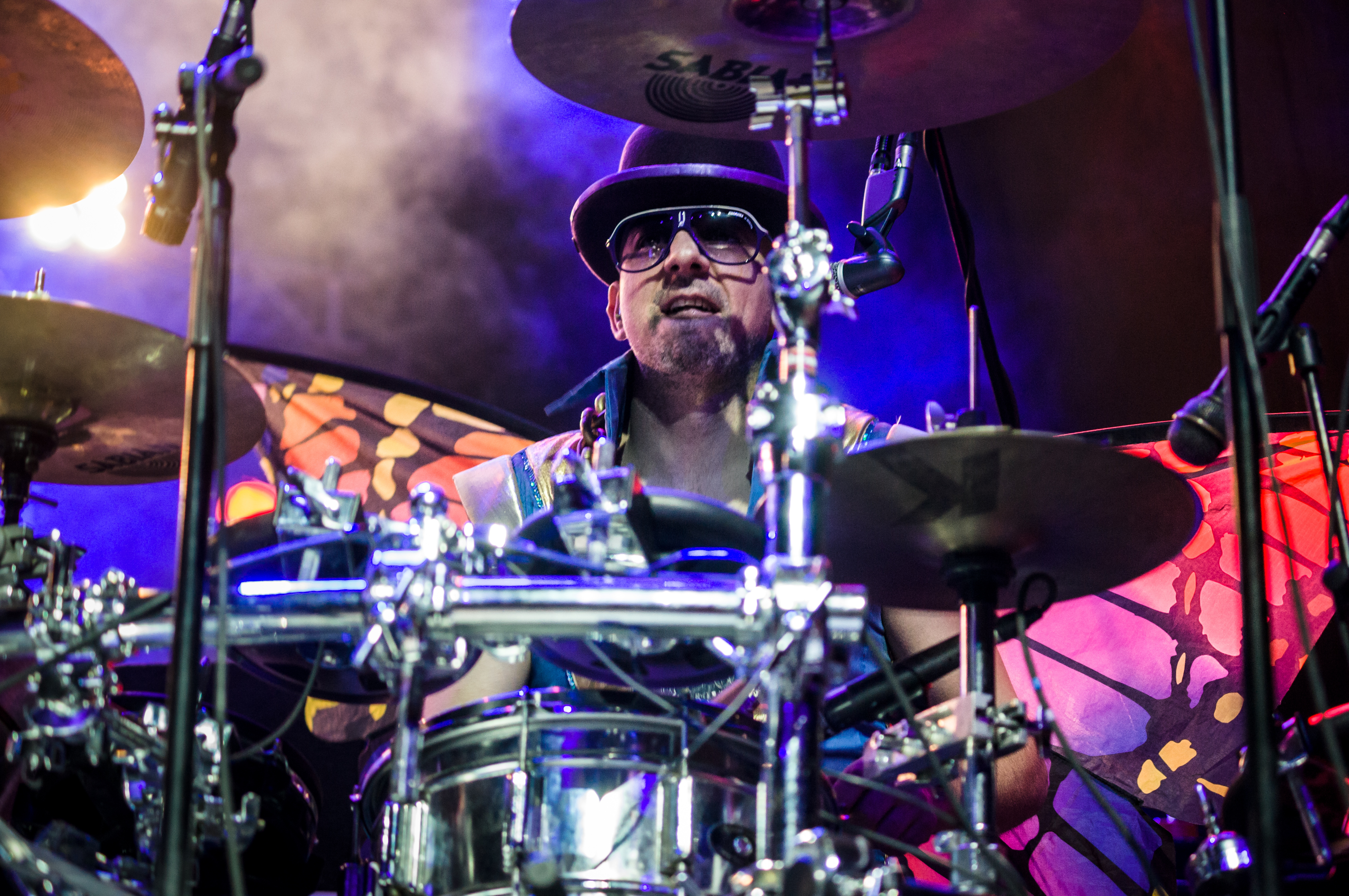 Piotr Koźbielski, perkusista zespołu Łąki Łan podczas Rocket Festiwal 2013 w Warszawie.